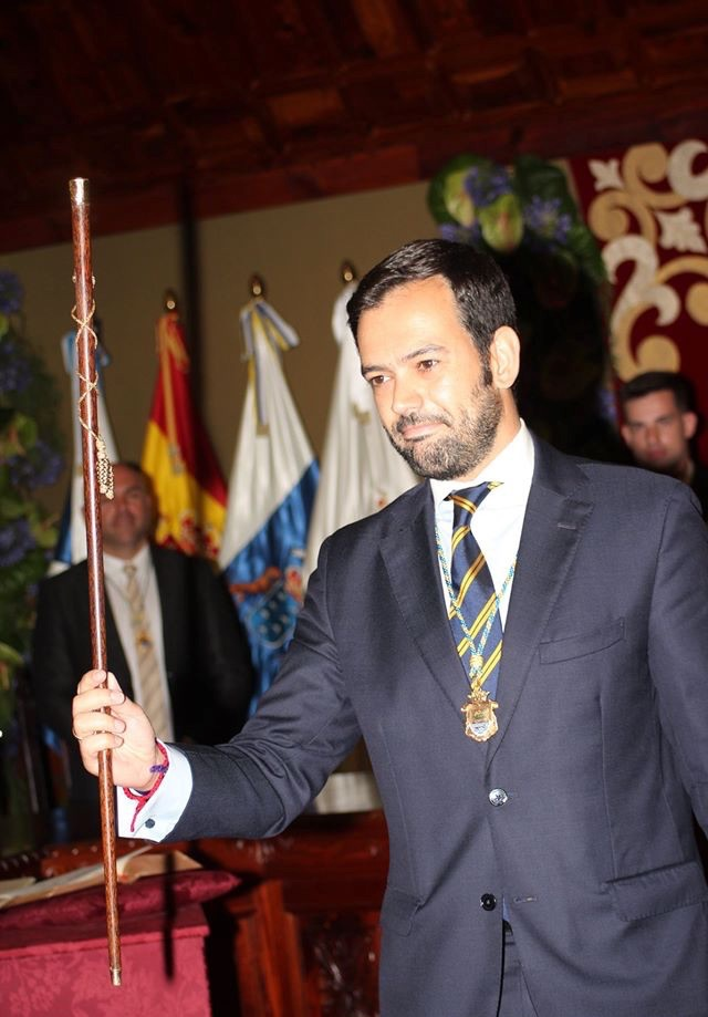 Lope Afonso (PP), alcalde de Puerto de la Cruz (2015- )